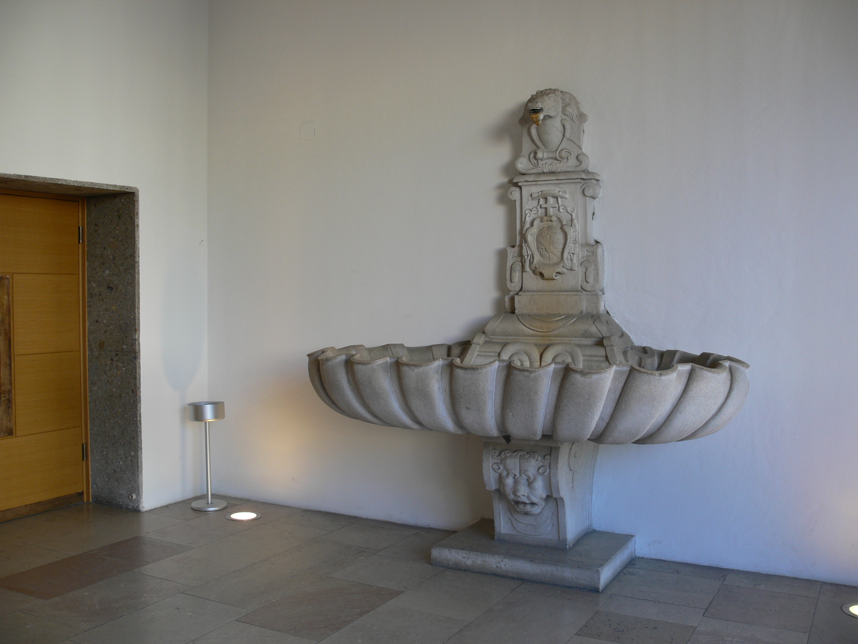 Salzburg, Festspielhauskomplex, Haus für Mozart (Kleines Festspielhaus) Brunnen am Eingang